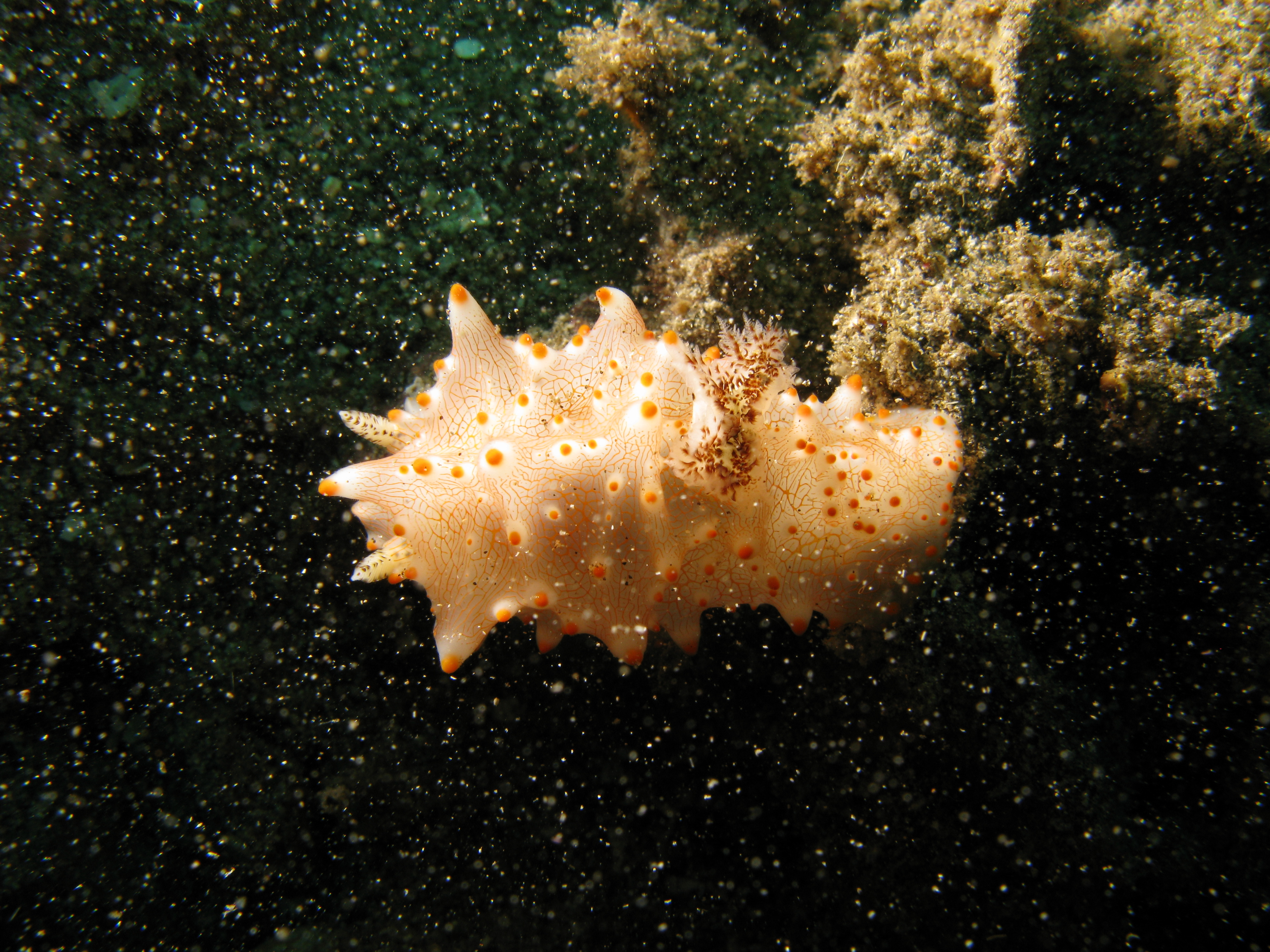 Nudibranch - Halgerda Malesso